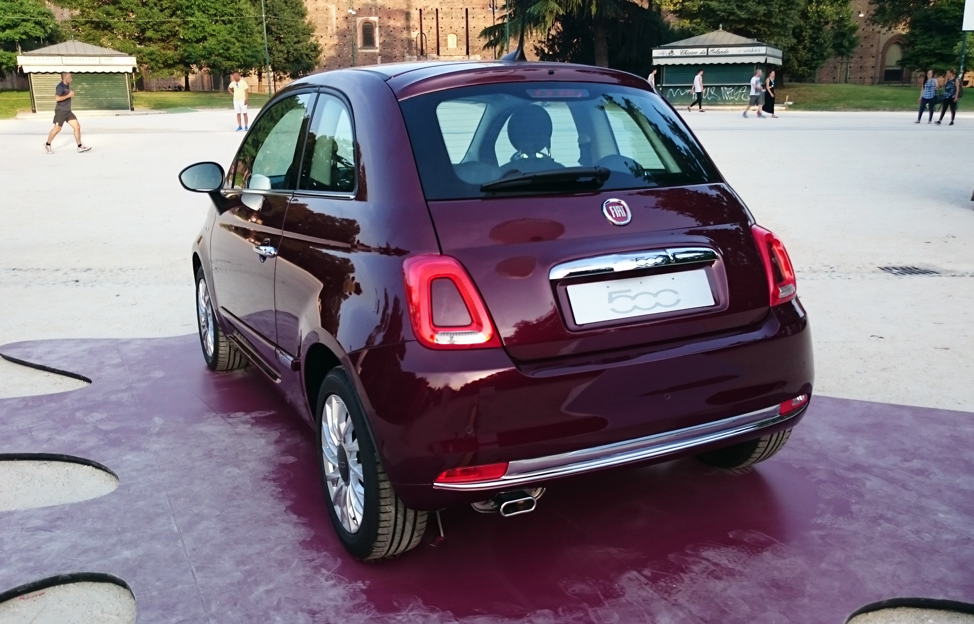 Il restyling della Fiat 500 nel luglio 2015 esposta al Parco Sempione di Milano (Castello Sforzesco). Alla presentazione erano presenti un modello viola e un modello bianco